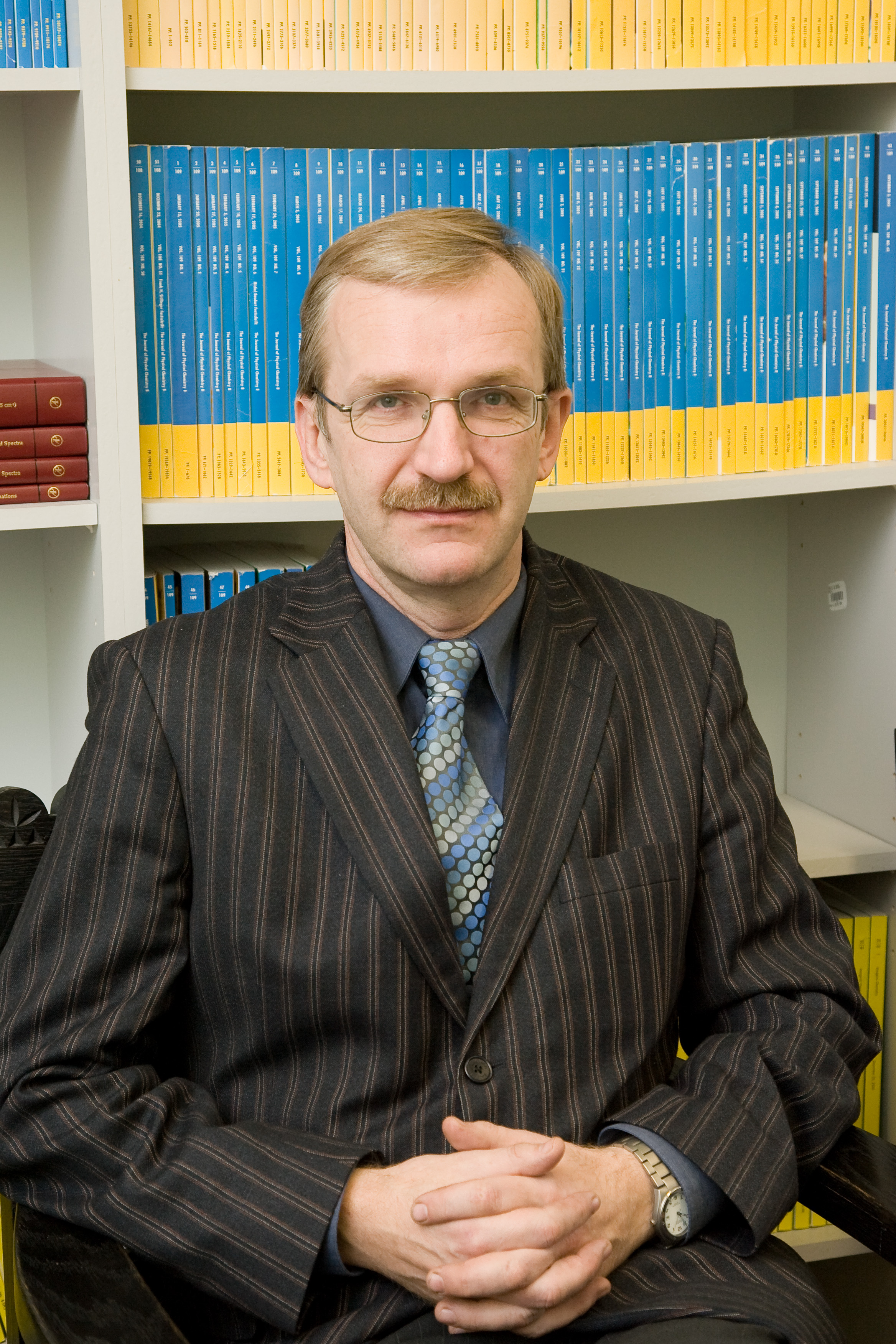 Tartu Ülikooli Keemia Instituudi bioorgaanilise keemia õppetooli bioorgaanilise keemia professor Ago Rinken.